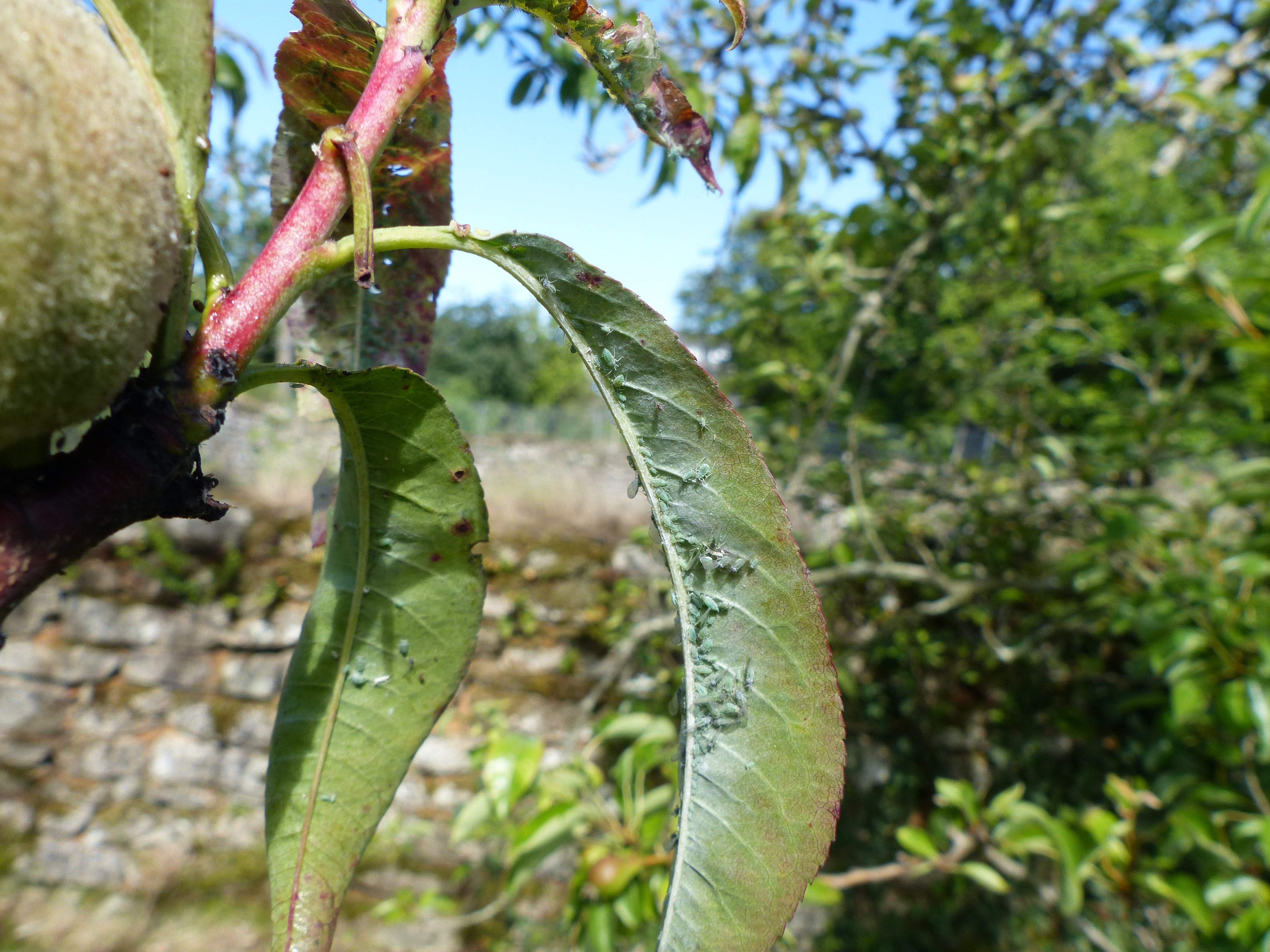 Pucerons verts du pêcher sur un pêcher dans un jardin particulier à Josselin, en Bretagne.